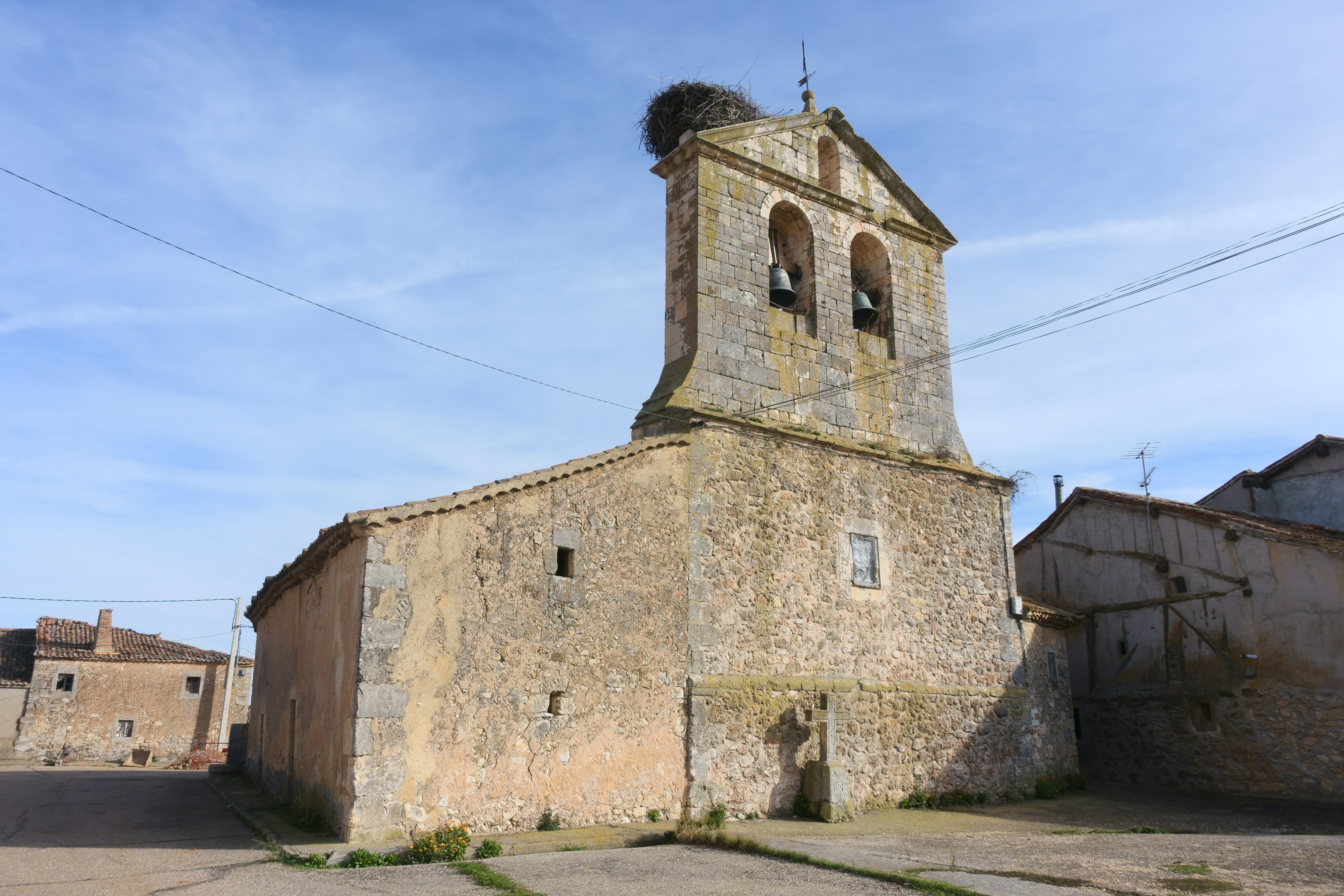 Iglesia de Santo Domingo de Guzmán, Pajarejos (Segovia, España).